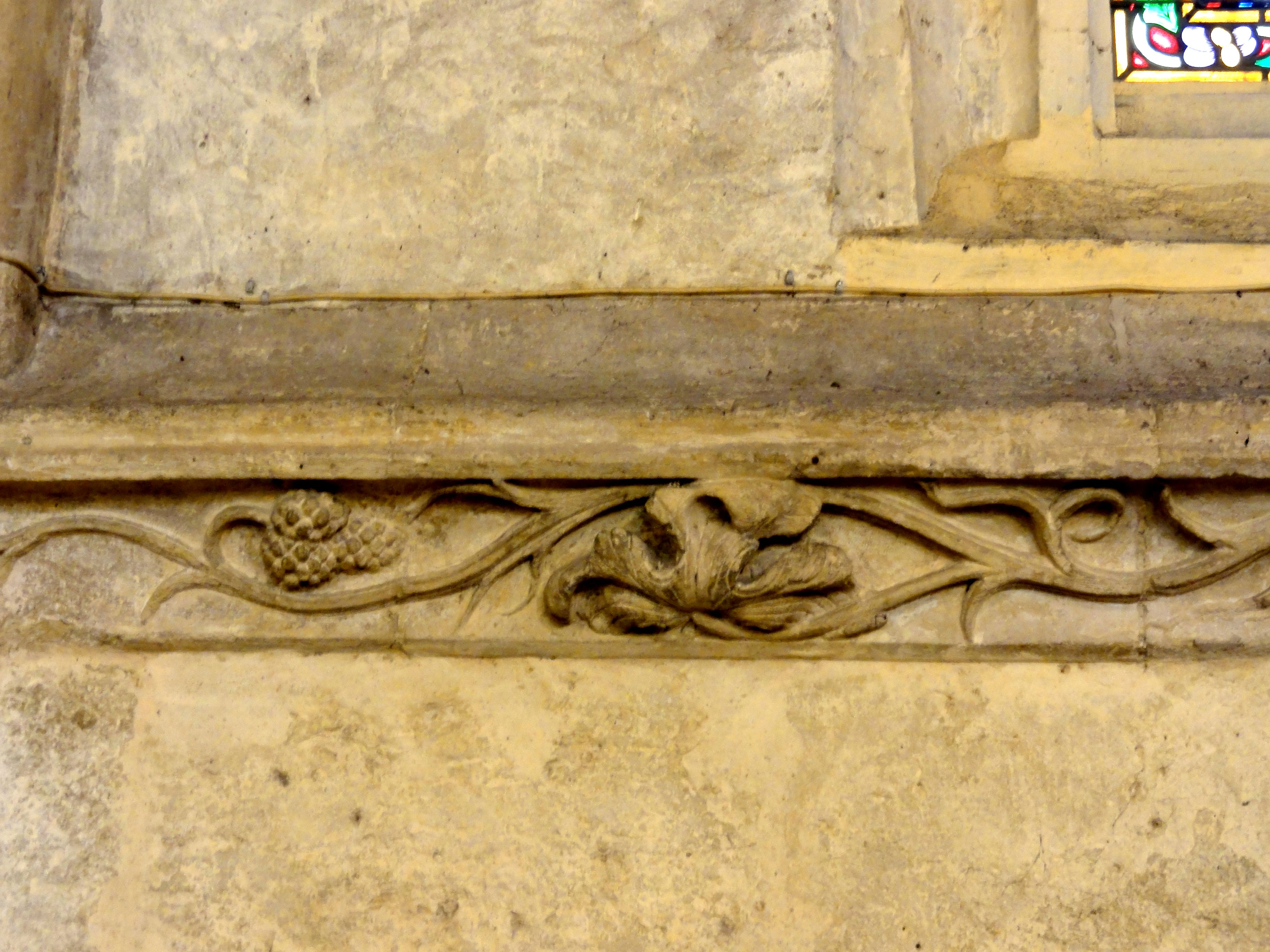 Bas-côté nord de la nef, frise sur le mur nord (première à troisième travée).